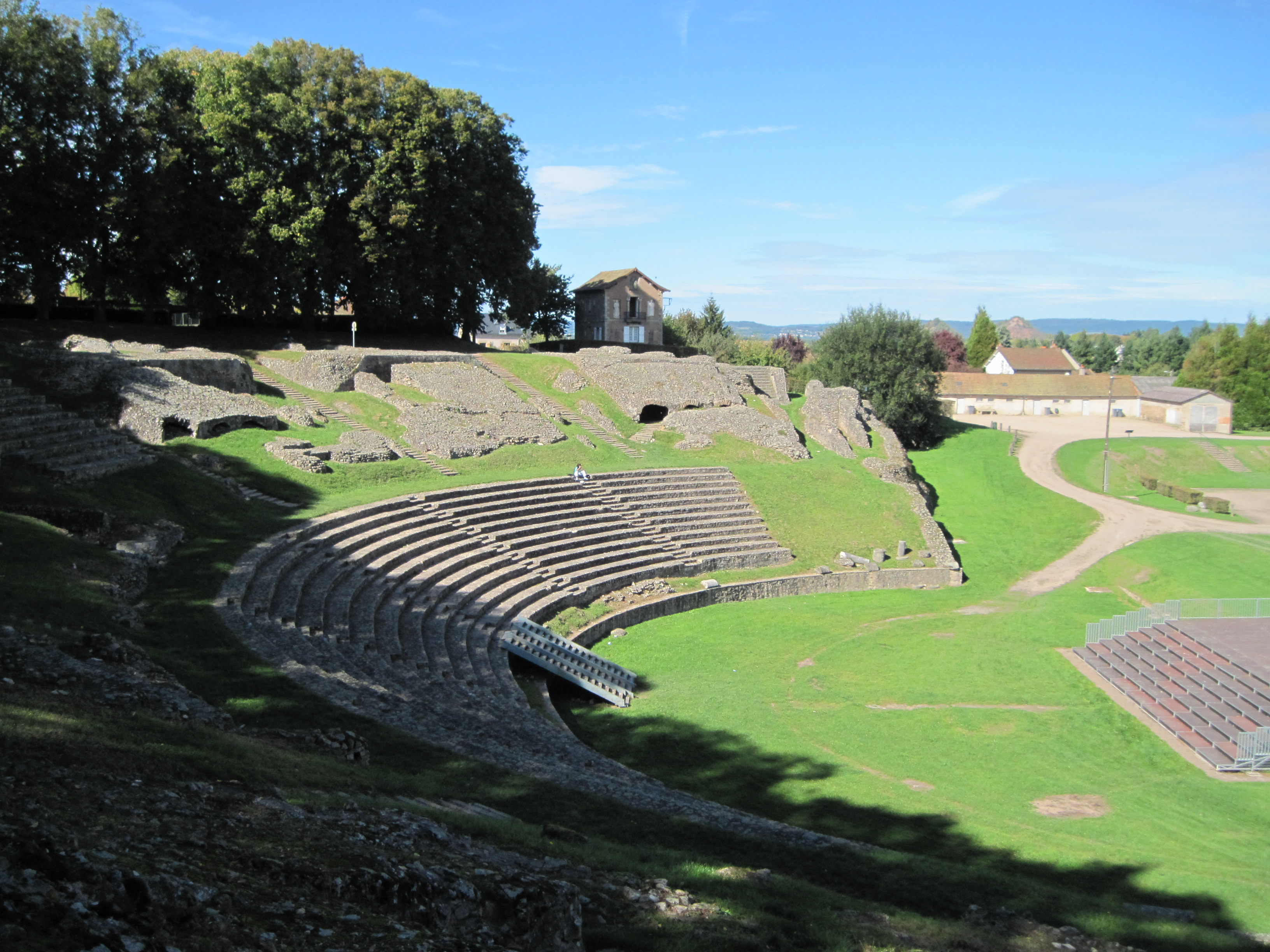 Interlingua: Le theatro antique de Augustodunum (le actual Autun).